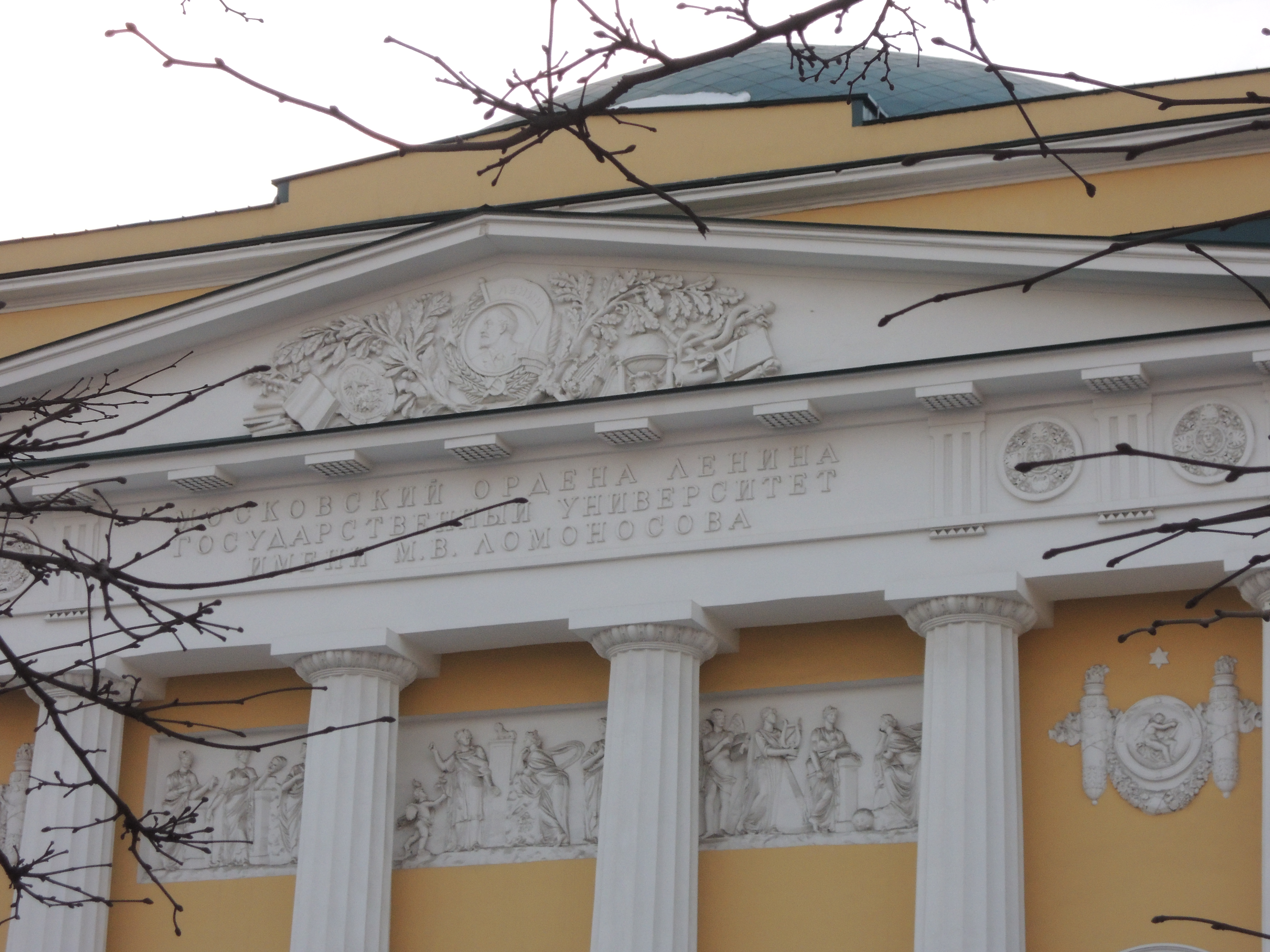 Старое здание МГУ на Моховой